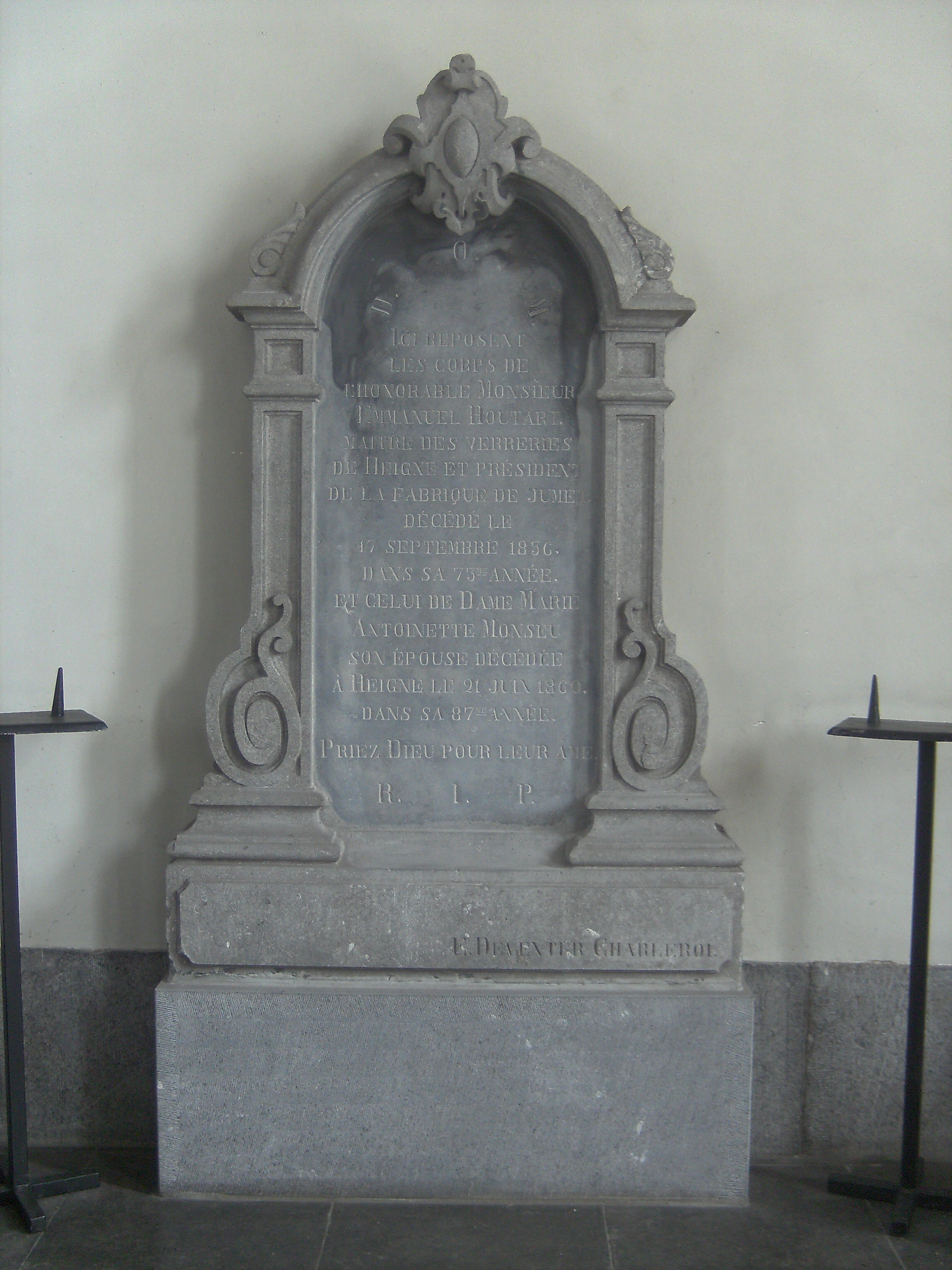 Jumet (Charleroi - Belgique) - Église Saint-Sulpice - stèle dans le déambulatoire. Texte : Ici reposent les corps de l'honorable Monsieur Emmanuel Houtart, maître des verreries de Heigne et président de la fabrique de Jumet, décédé le 17 septembre 1856, dans sa 73me année, et celui de Dame Marie Antoinette Monseu son épouse décédée à Heigne le 21 juin 1860, dans sa 87me année. Priez Dieu pour leur âme.